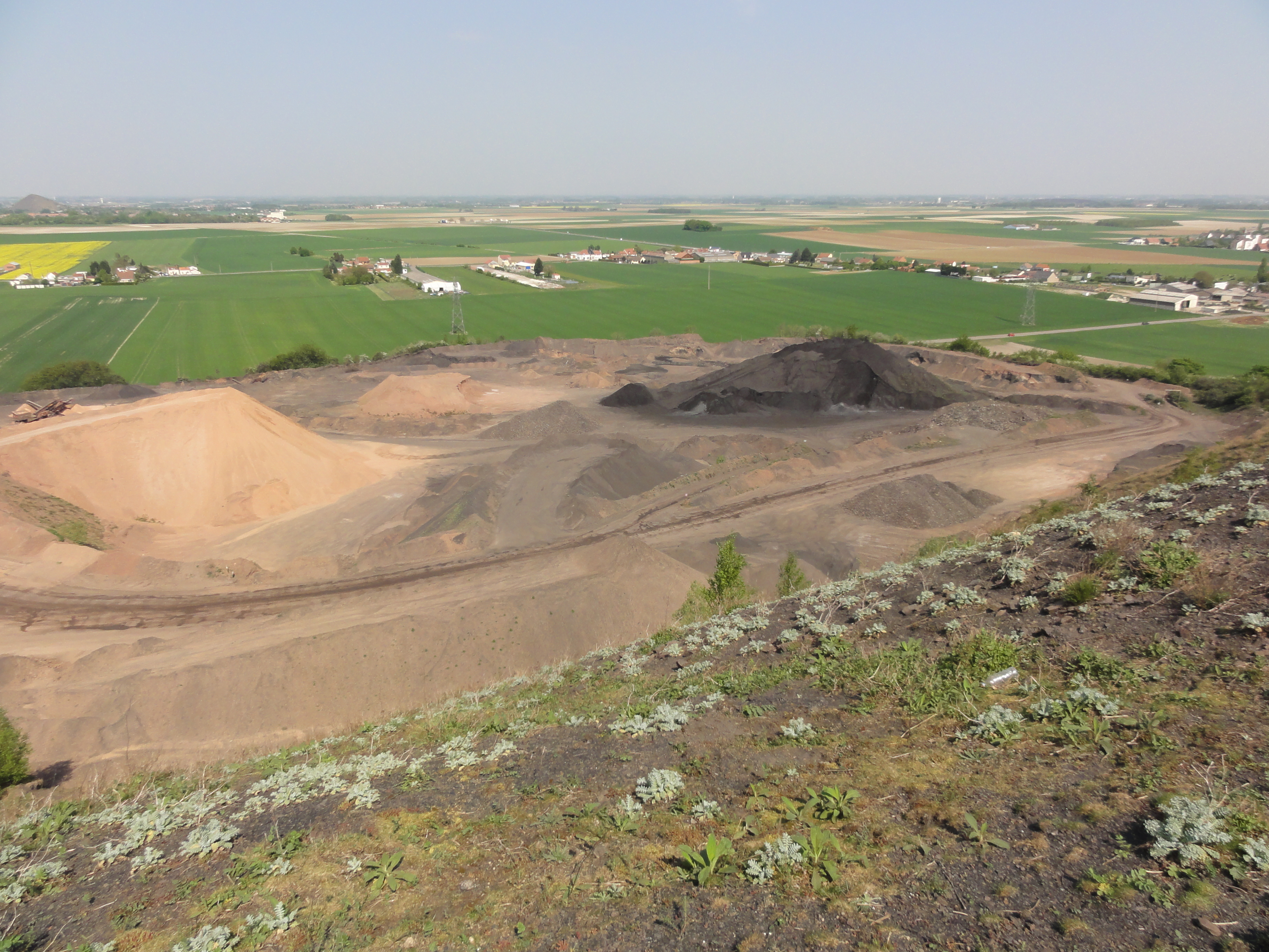 Terril n° 79 dit 16 de Lens Est, Fosse n° 16 de la Compagnie des mines de Lens, Loos-en-Gohelle, Pas-de-Calais, Nord-Pas-de-Calais, France.